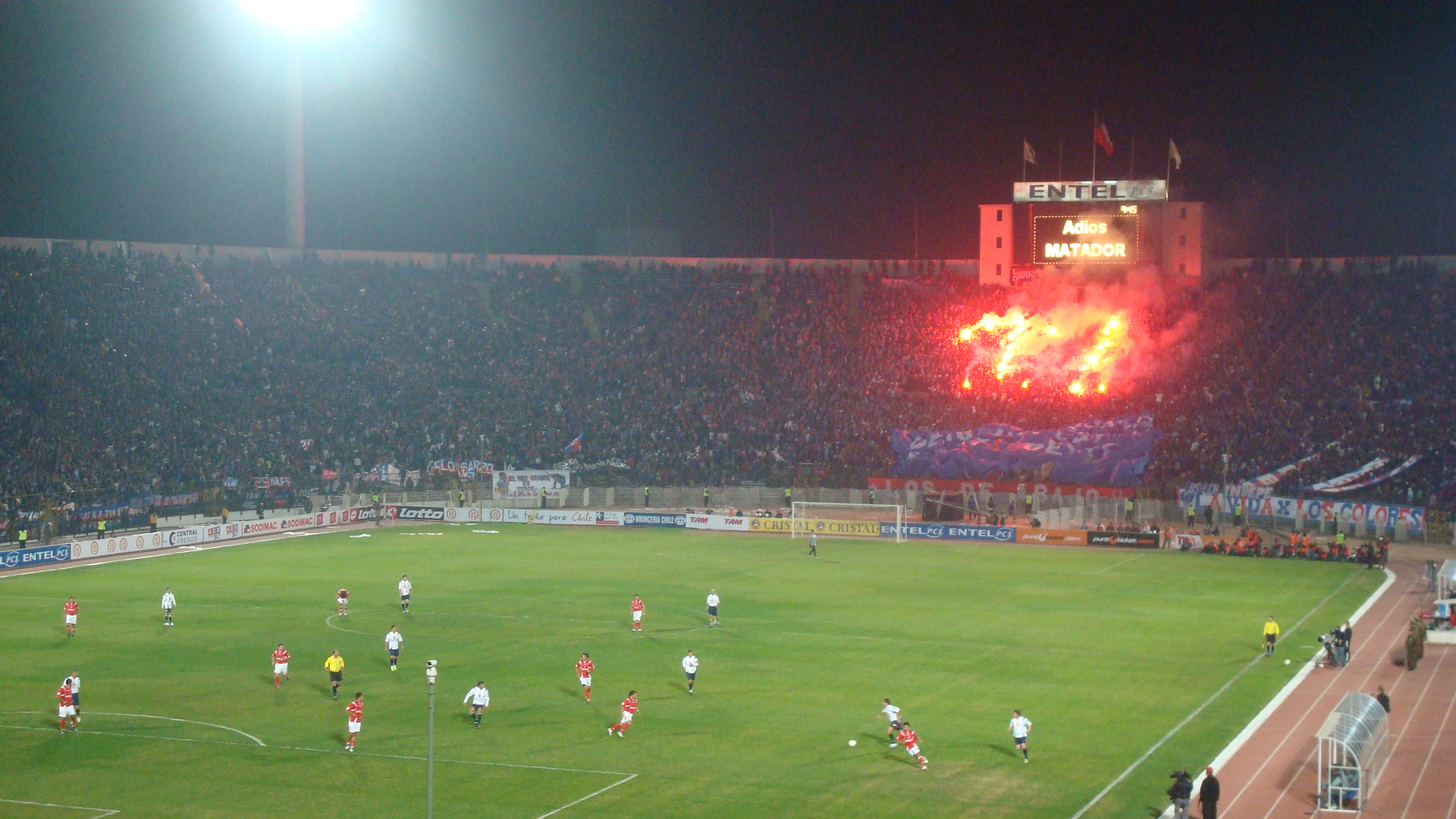 Partido de despedida Marcelo Salas, Estadio Nacional de Chile, Ñuñoa, Santiago de Chile